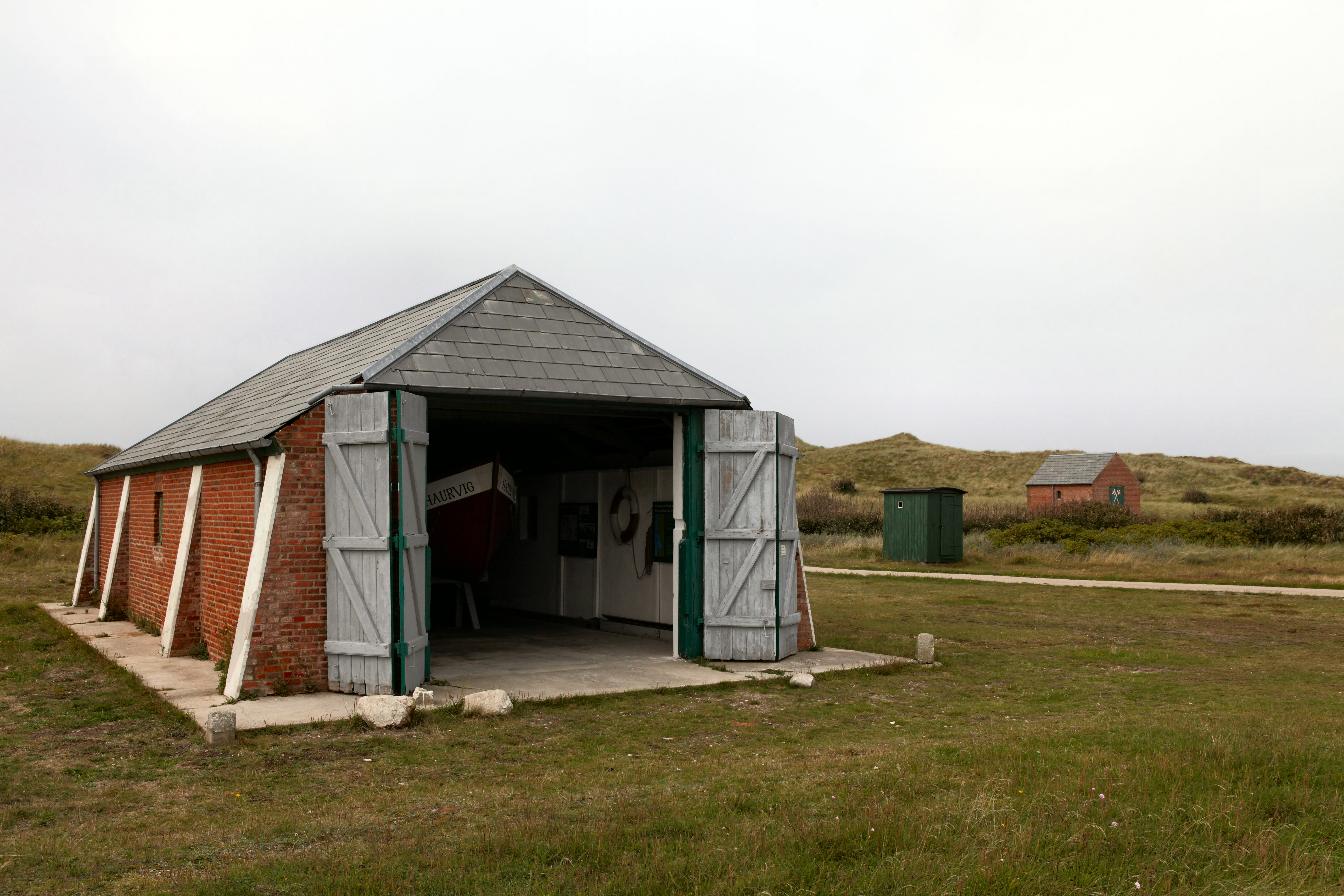 Haurvig redningsstation (museum)